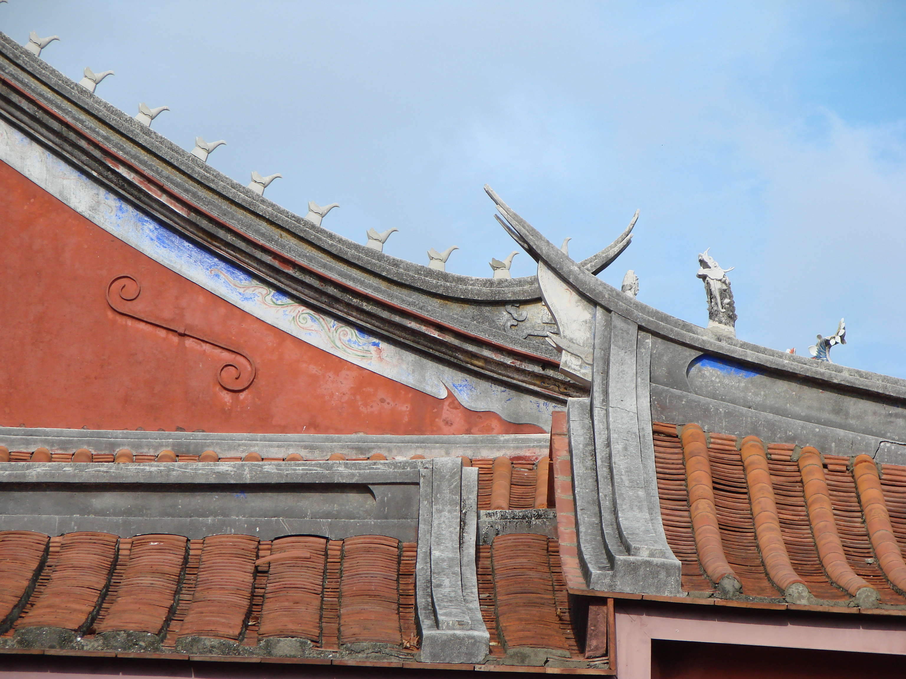 燕尾屋脊 壁鎖 規帶 大成殿的脊獸:鴟鶚 西廡的脊獸:螭吻